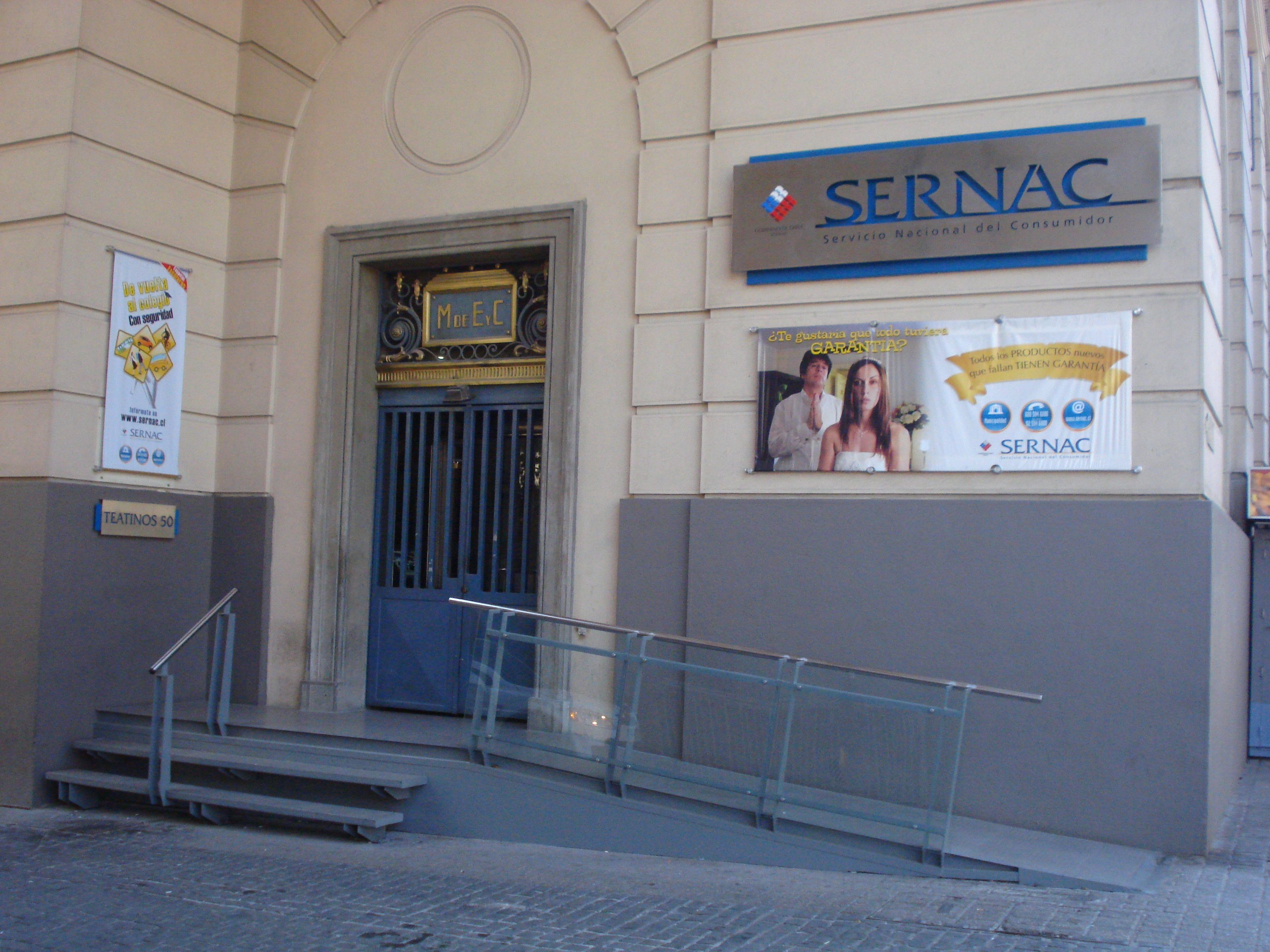 El Servicio Nacional del Consumidor, más conocido por la sigla Sernac, es un servicio público chileno, responsable de cautelar y promover los derechos del consumidor, establecidos en la Ley 19.496,[1] además de educar a los mismos sobre sus derechos y deberes.[2] Aún no se ha designado un director nacional, luego de la renuncia de José Roa en febrero de 2010.